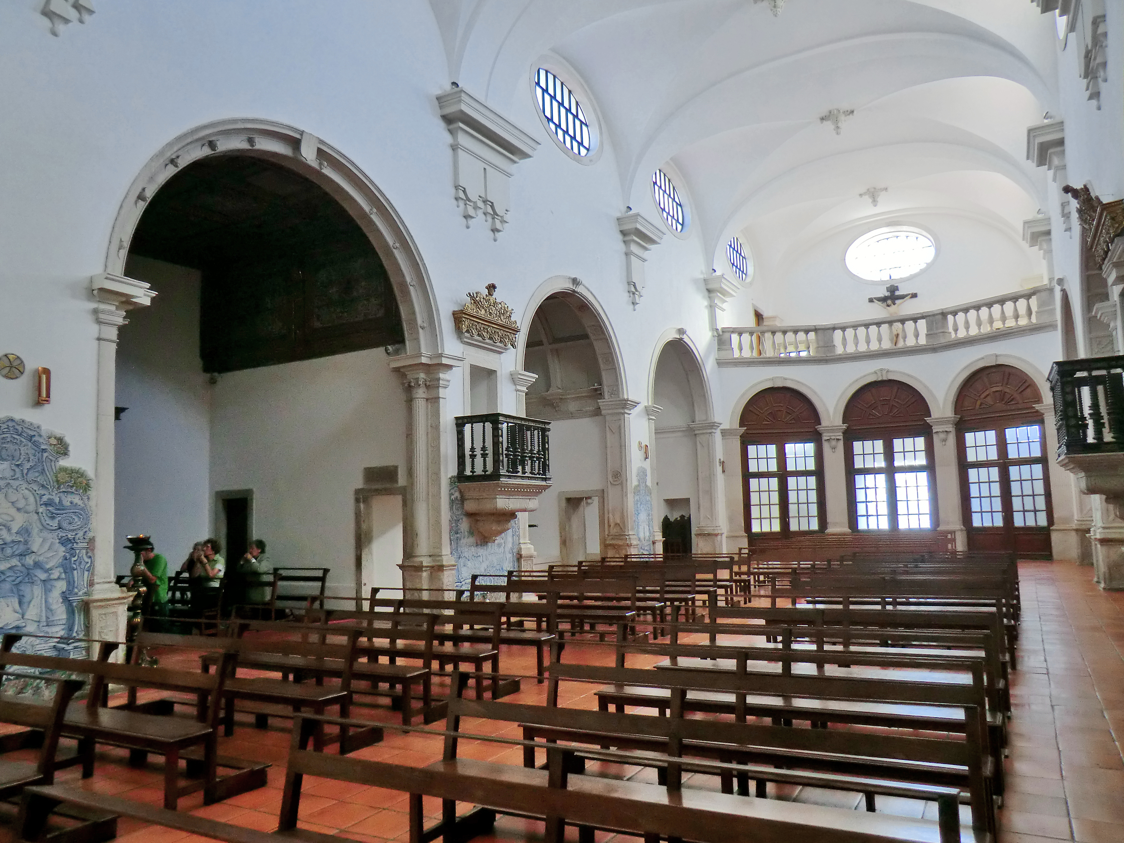 Sé Catedral de Aveiro ou Igreja de São Domingos This file was uploaded for Wiki Loves Monuments in Portugal with the unique identifier 73187.